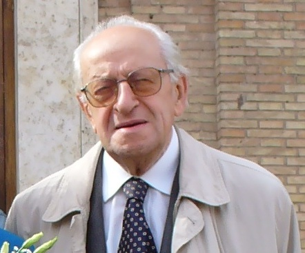 il giorno del 50° anniversario delle sue nozze con Ada Gibellino, presso la Chiesa di Santa Maria delle Grazie a Roma